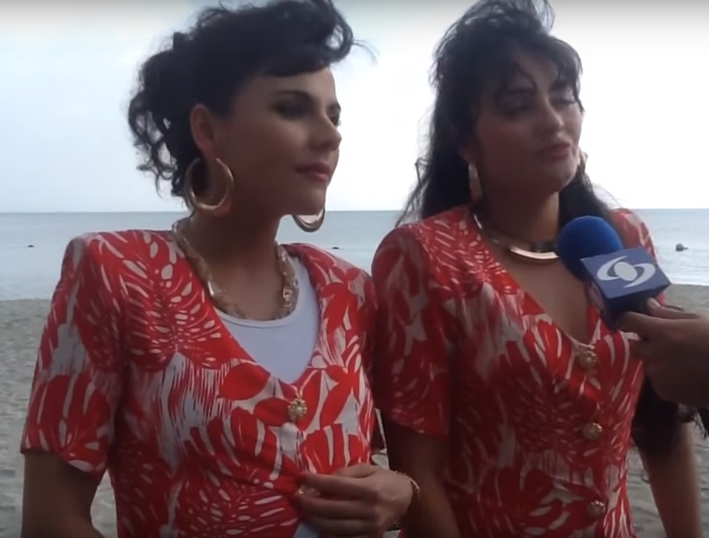 Detrás de Cámara del Rodaje de la serie de Caracol Televisión en Santa Marta "Las Hermanitas Calle"